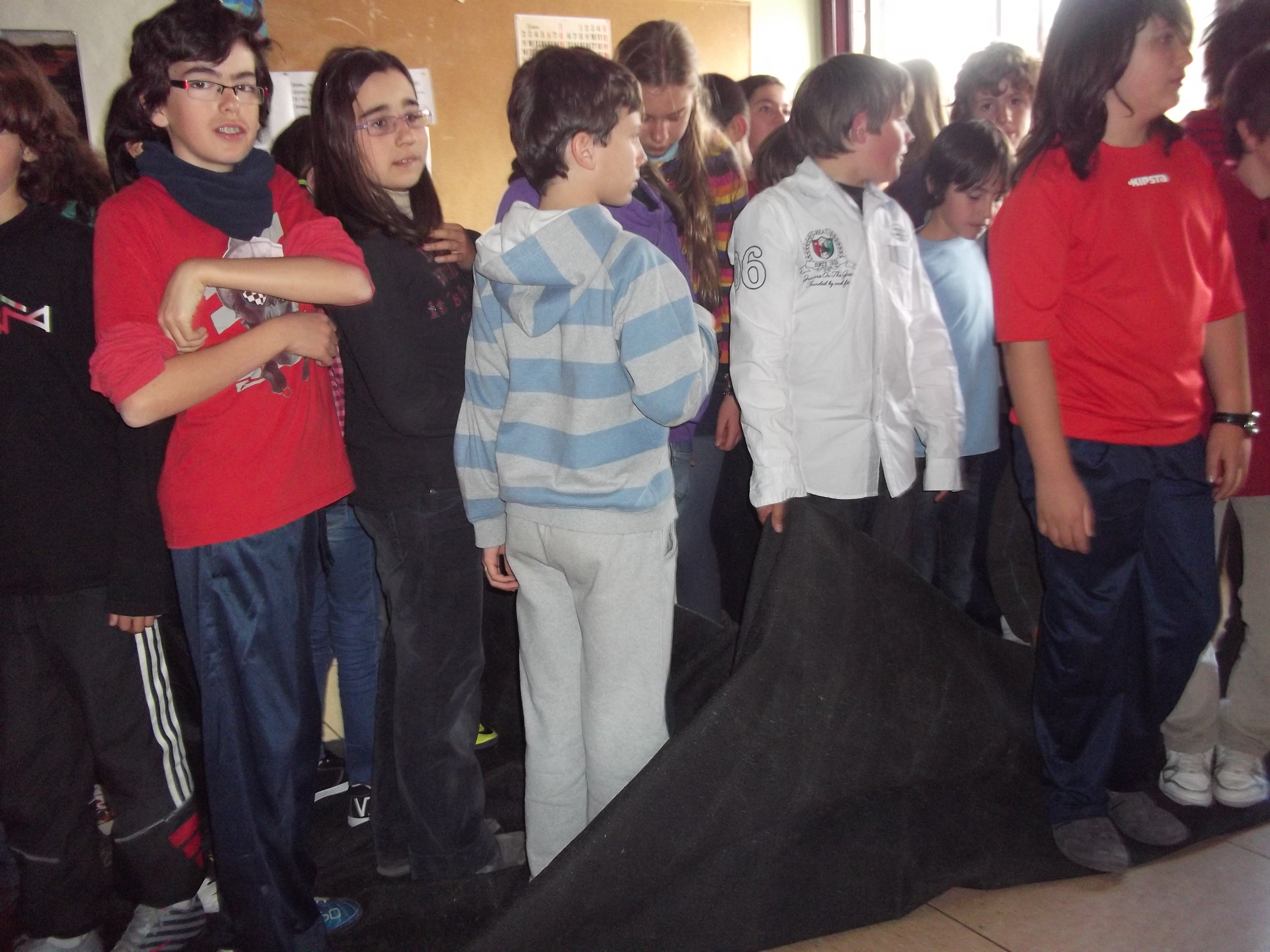 Alumnos de 6º de Primaria haciendo el reto de la alfombra para el proyecto Lóva